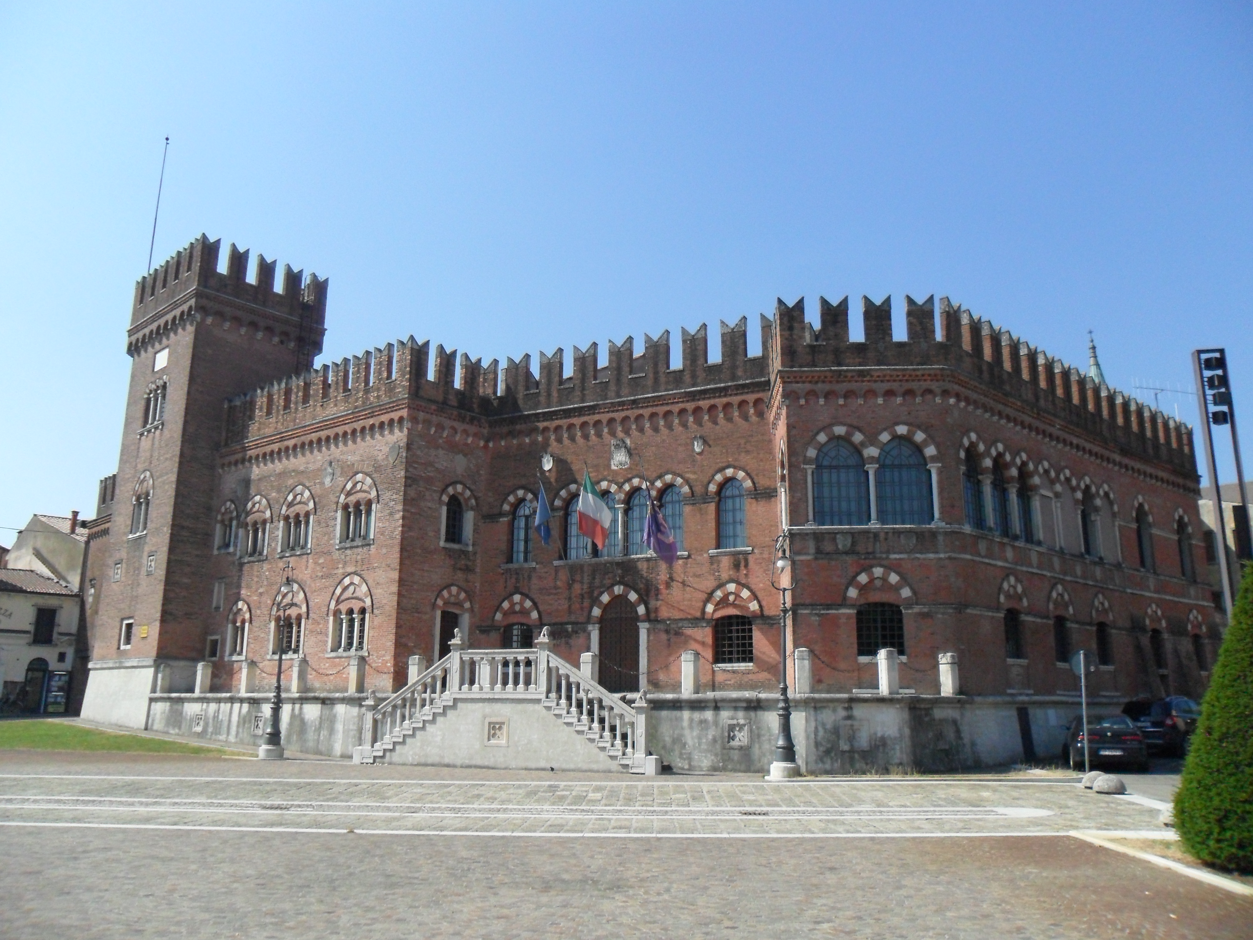 Situato in via Corso Guà, il palazzo pretorio è sede del Comune.